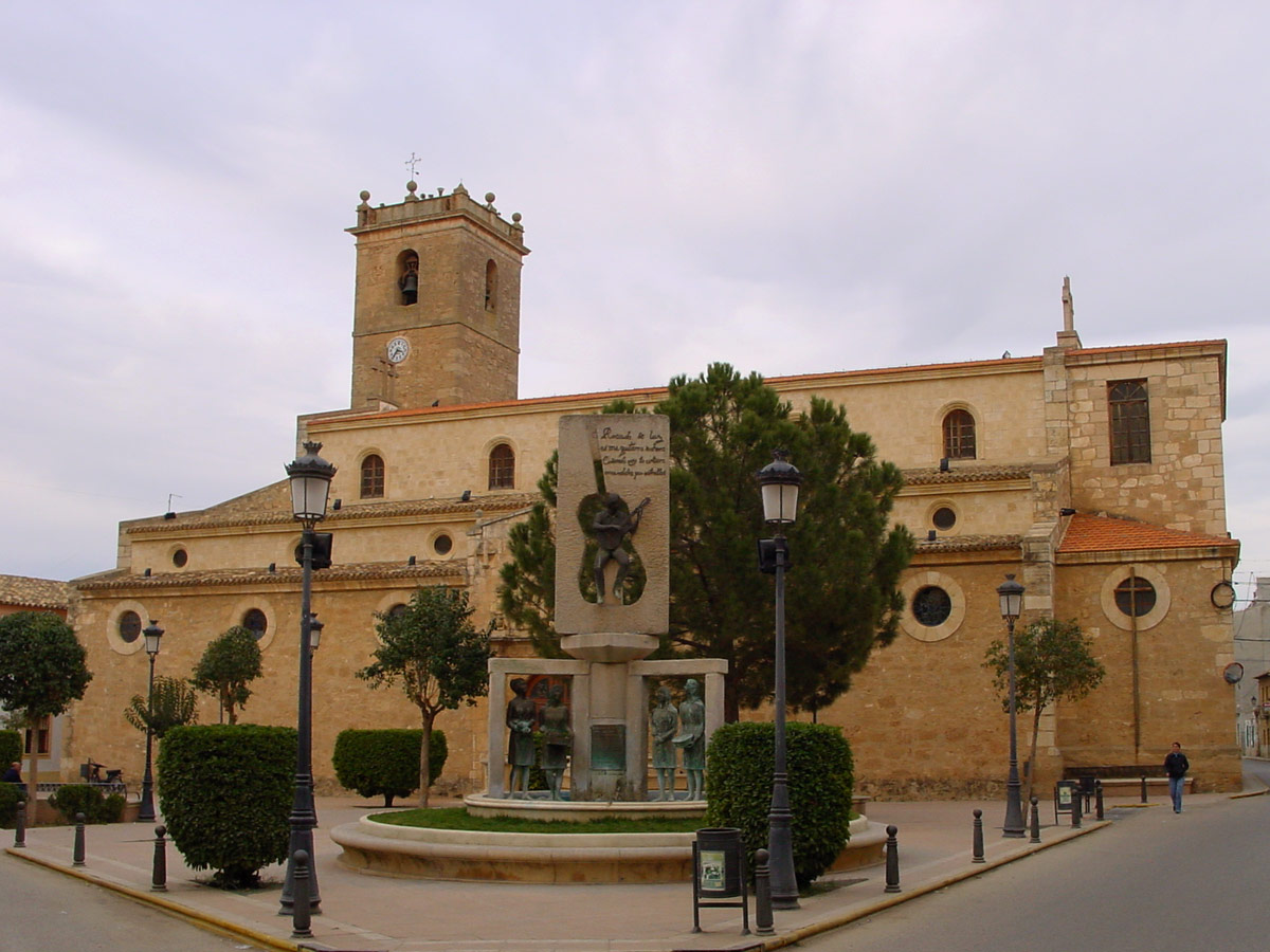 Iglesia de Casasimarro